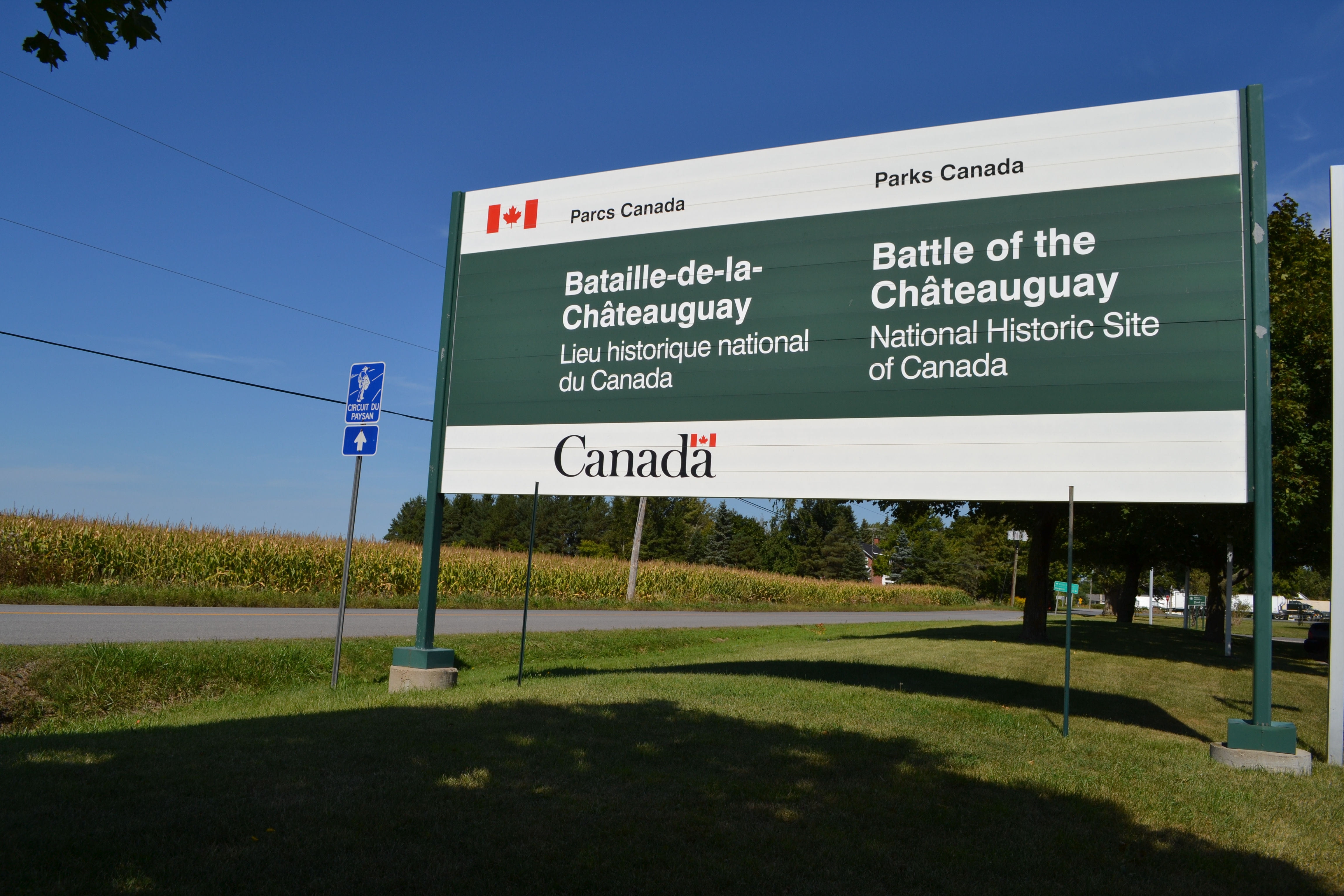 Le lieu historique national du Canada de la Bataille-de-la-Châteauguay est au centre du champ de bataille de la guerre de 1812 situé sur les berges de la rivière Châteauguay à Allans's Corners, dans la municipalité de Howick.